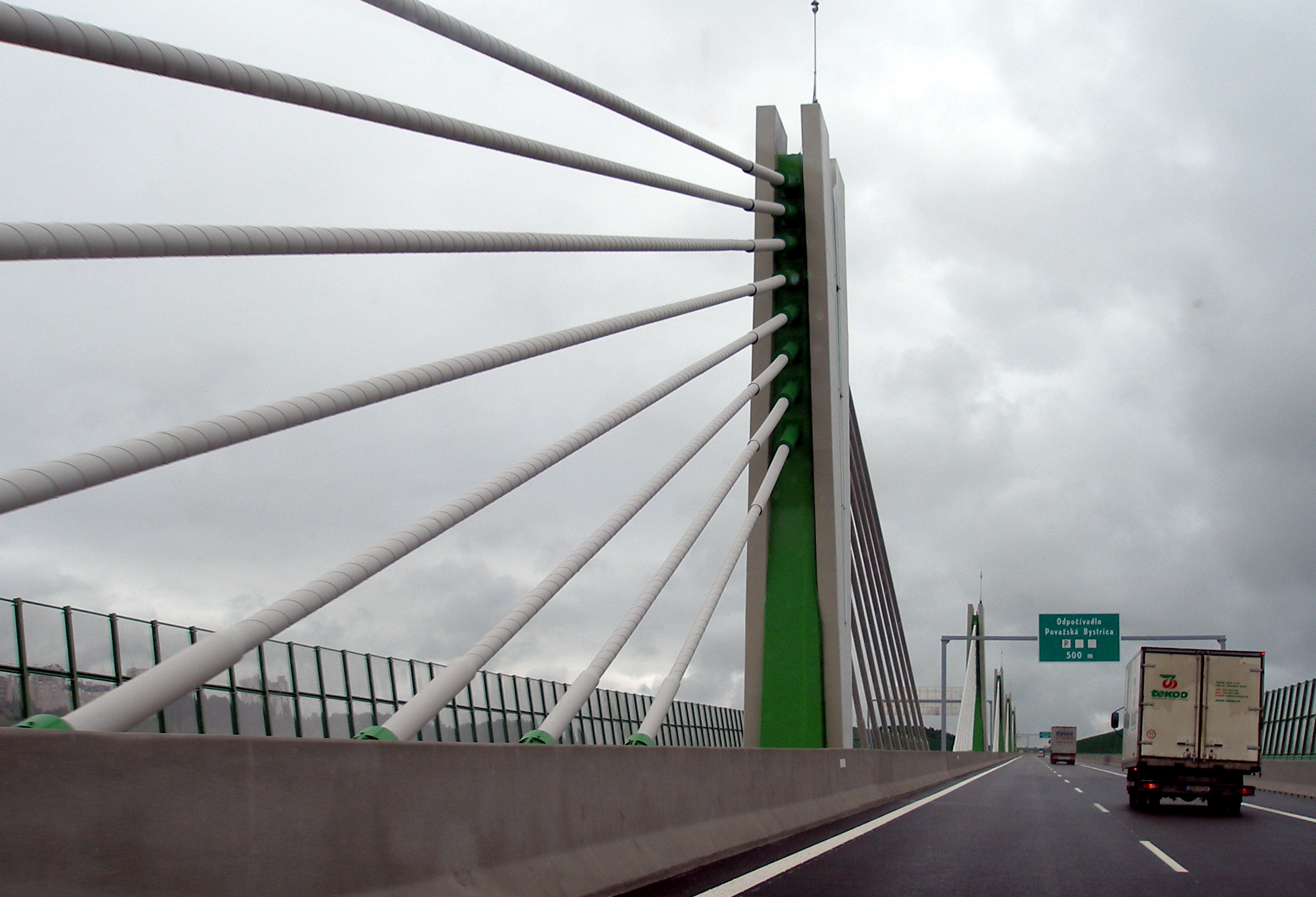 Diaľnica ponad mesto Považská Bystrica